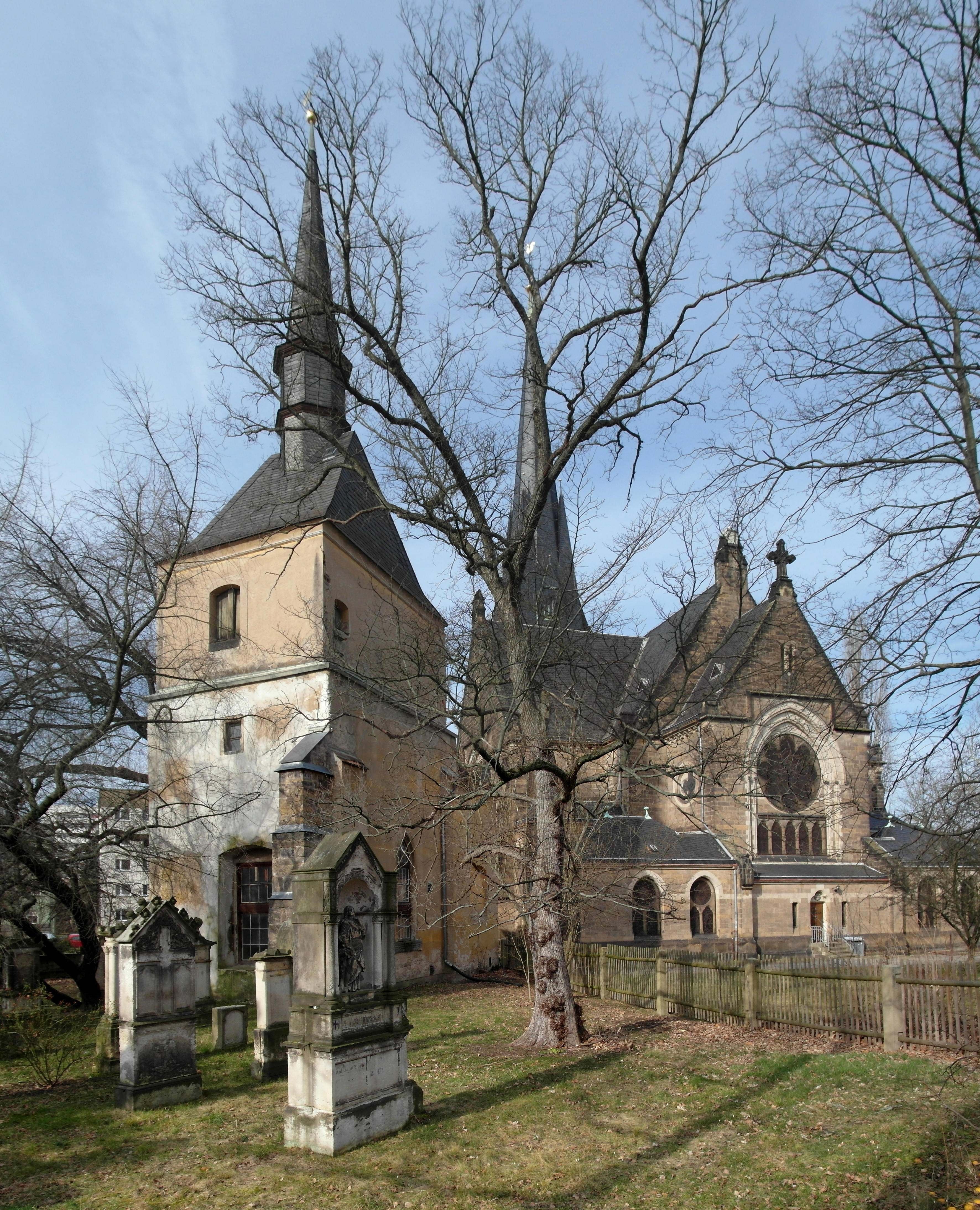 20.02.2018 01257 Dresden-Leuben, Altleuben 13: Die Alte Leubener Pfarrkirche (GMP: 51.010717,13.825960) links im Bild entstand 1512. Bis auf den Turm wurde sie von 1900 bis 1901 abgetragen und dafür 1901 die Himmelfahrtskirche rechts im Bild (GMP 51.010984,13.825880) im Stil der Neogotik nach Entwürfen von Karl Emil Scherz erbaut. Sicht von Südosten. [SAM4108+4109.JPG]20180220135MDR.JPG(c)Blobelt